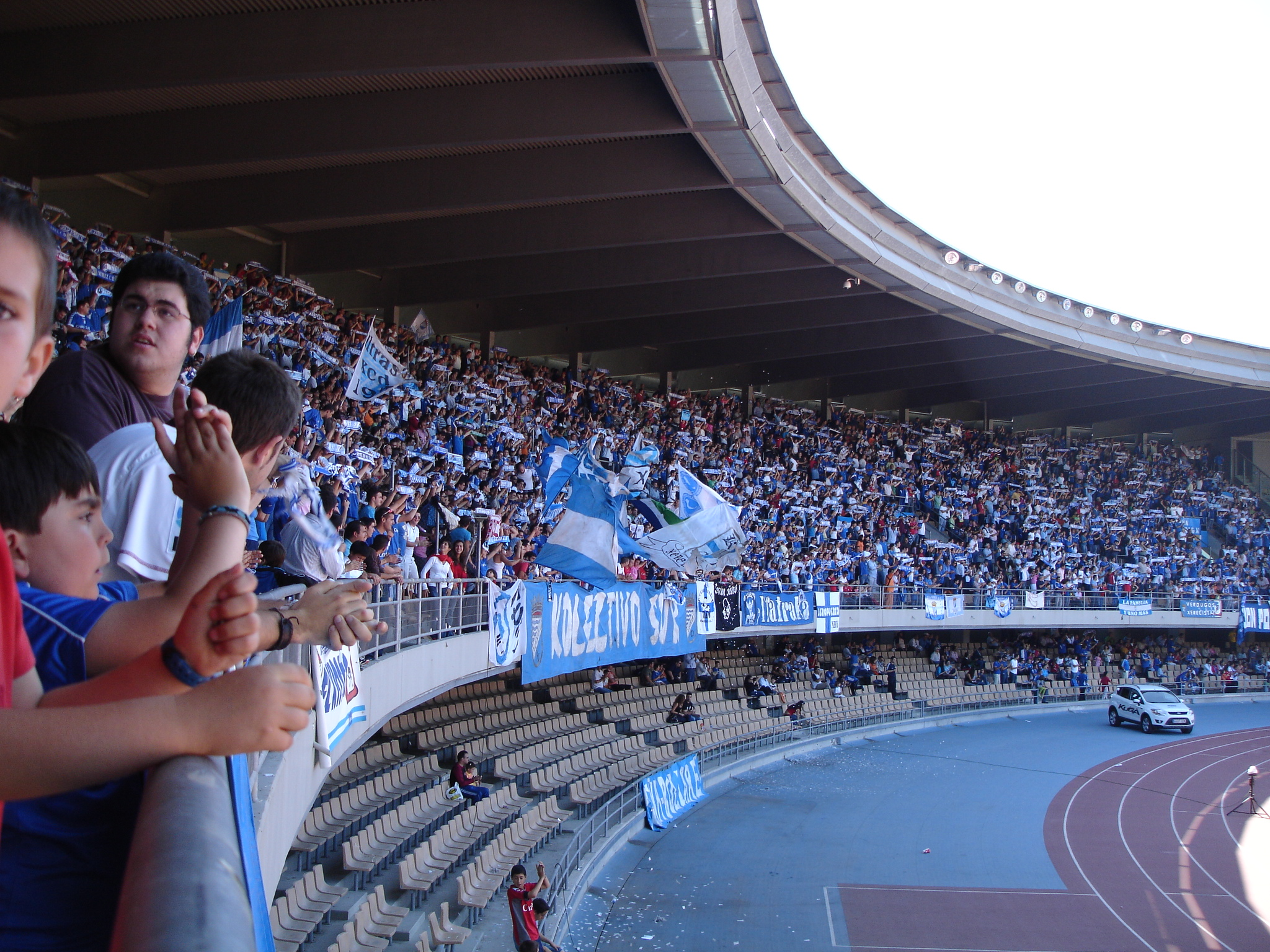 Xerez C.D. playing in Chapín. Jerez de la Frontera (Andalusia, Spain)